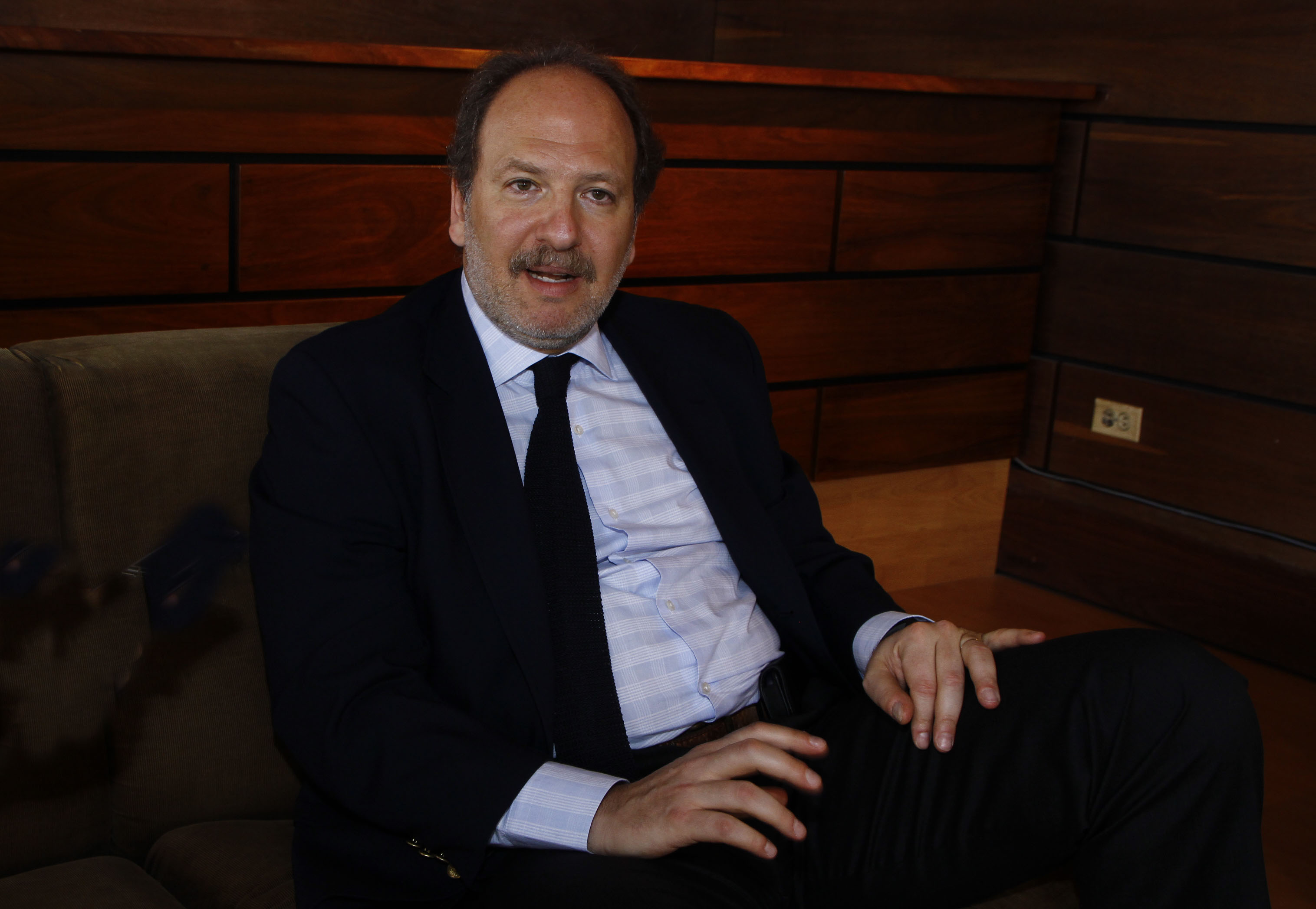 Quito, 01 sep (Andes).- En la ciudad de Quito se realizará el el Foro Latinoamericano de Comunicación en el que participaran expertos de vario spaíses como el argentino Damián Loreti. Foto: Micaela Ayala V./Andes